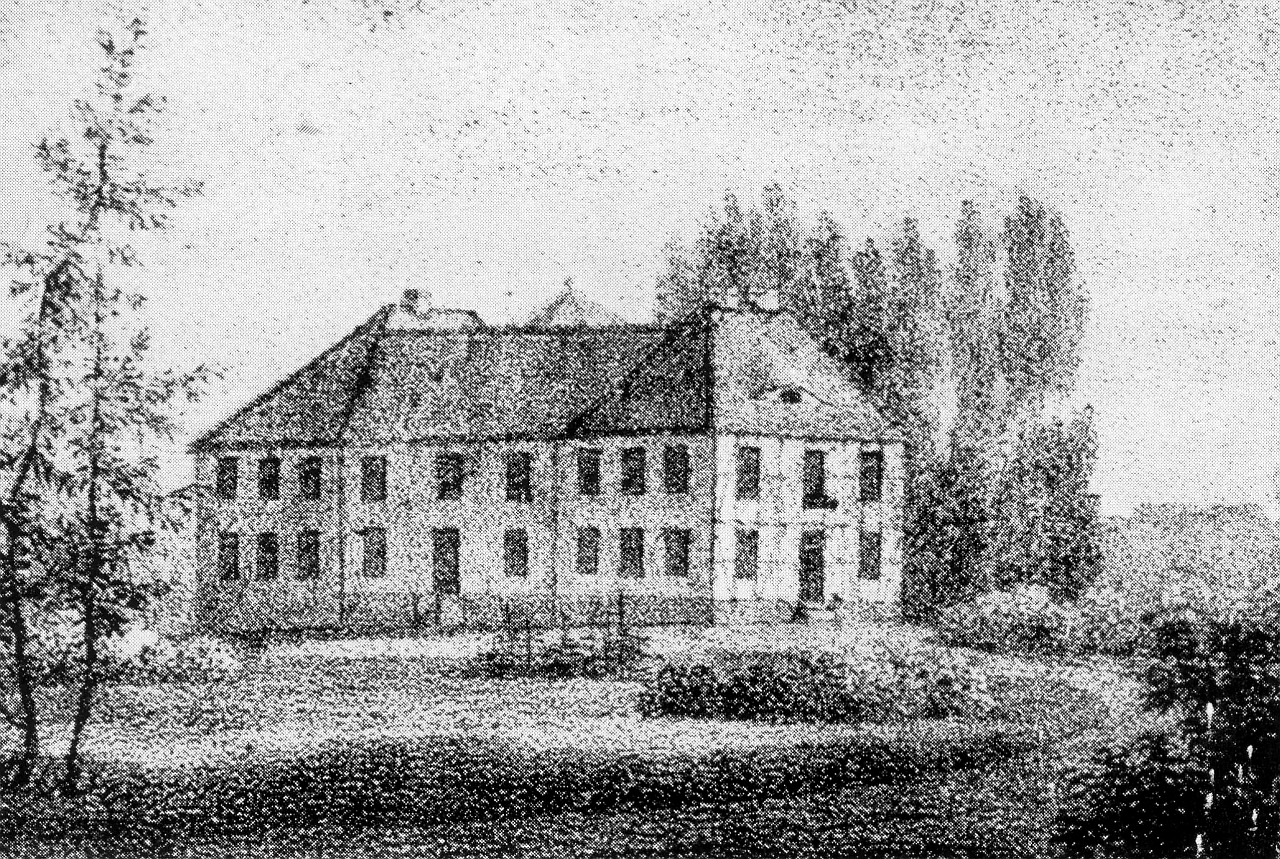 Braunschweig: Das um 1824 abgerissene Anatomiegebäude des Anatomisch-Chirurgischen Instituts des Collegium Carolinum am „Anatomieberg“ (heute Gaußberg).